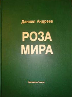 Книга Д.Андреева "Роза мира" (1991)